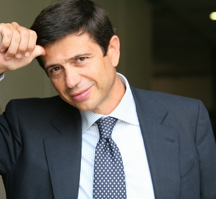 Foto dell'onorevole Maurizio Lupi, vicepresidente della Camera dei Deputati.